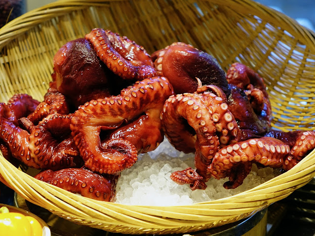 Octopus - osminoq (осьминог)